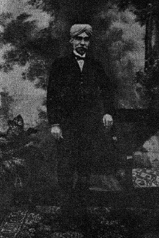 മുഹമ്മദ് ഹബീബുള്ള തിരുവിതാംകൂറിന്റെ ദിവാനായിരുന്നു.